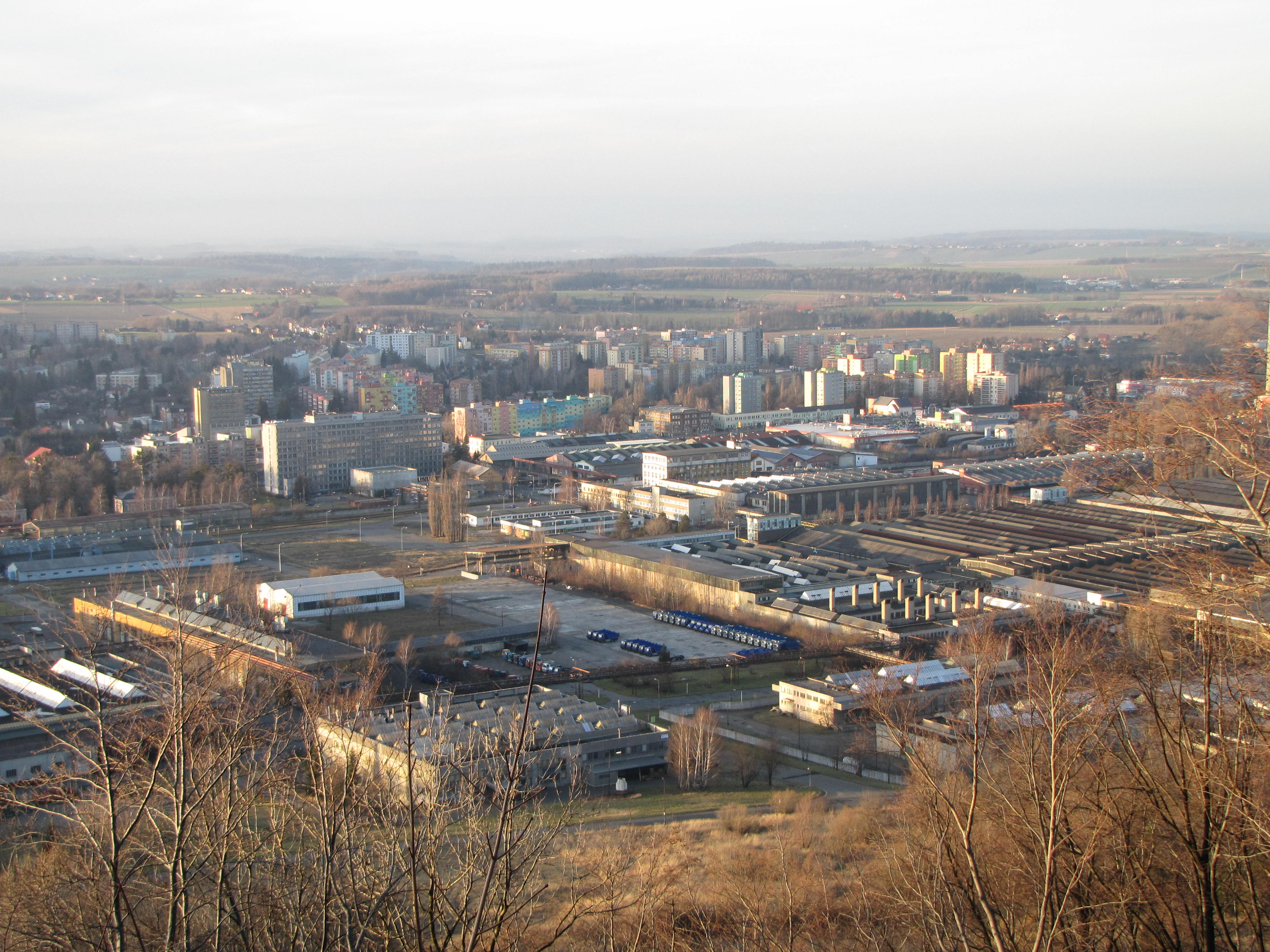 celkový pohled